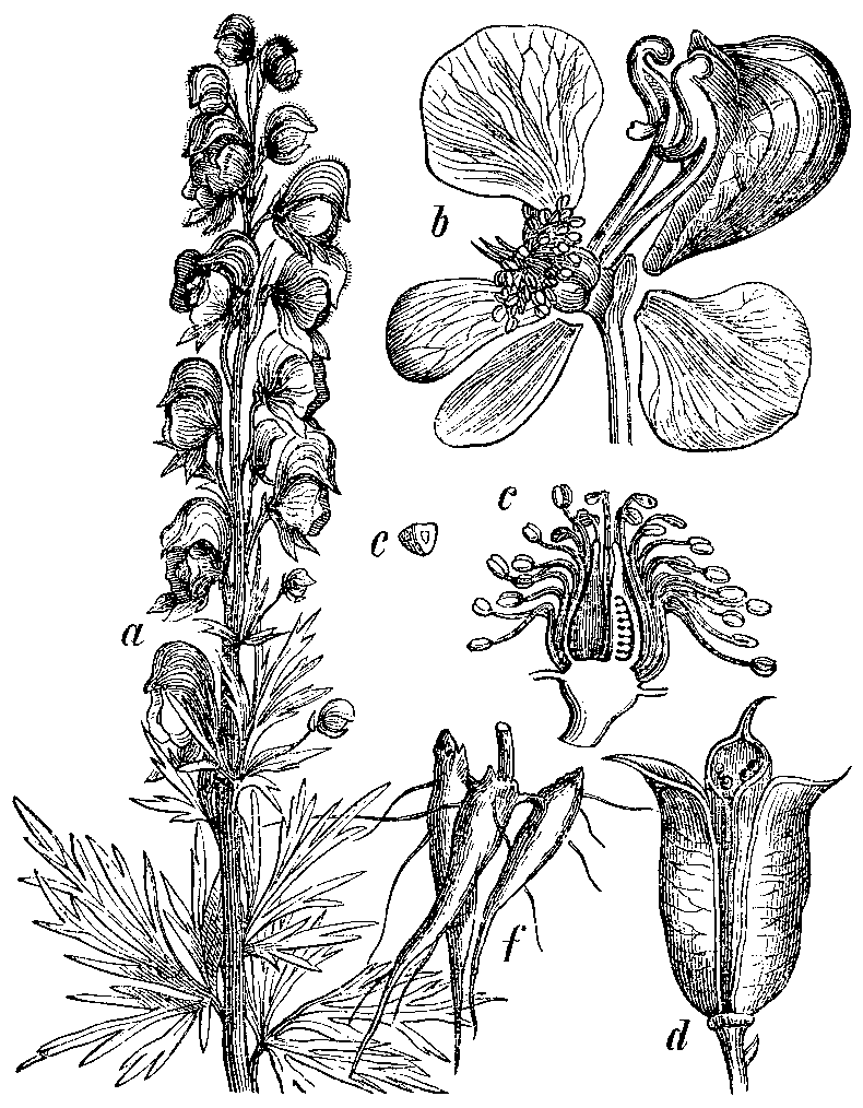 Slika 49. Navadni lisjak. (Aconítum Napéllus.)